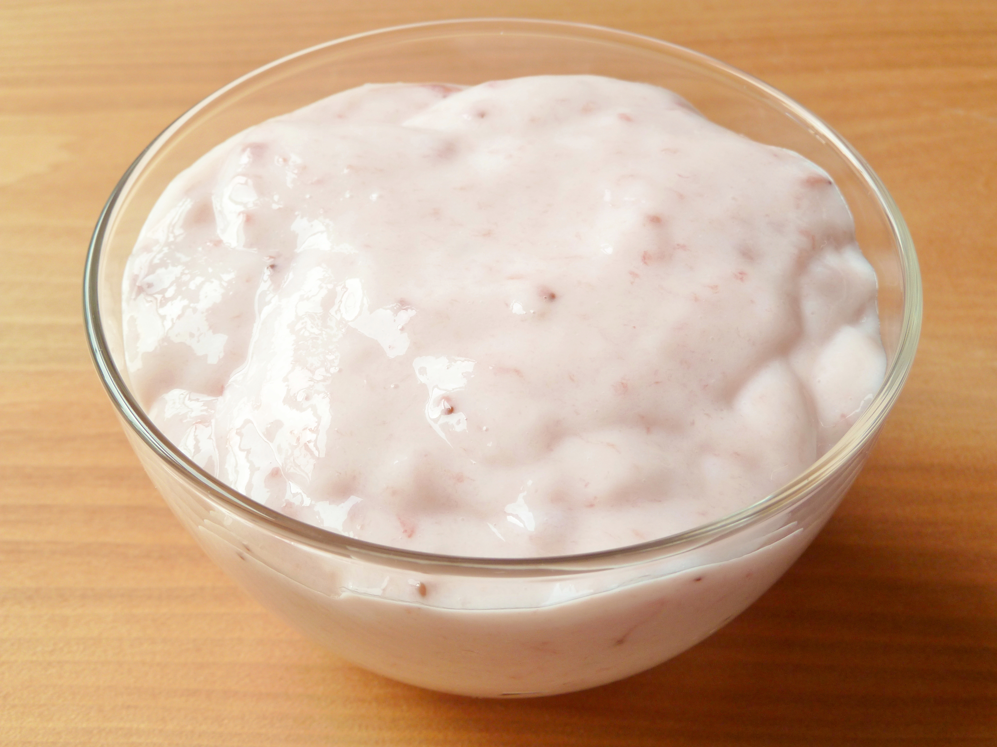 ハウス食品が販売しているデザートベース「フルーチェ」のイチゴ味。パッケージに記載されているレシピ通りに作成。